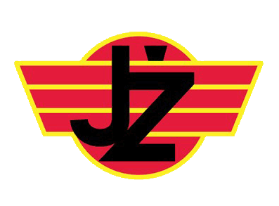 JŽ logo